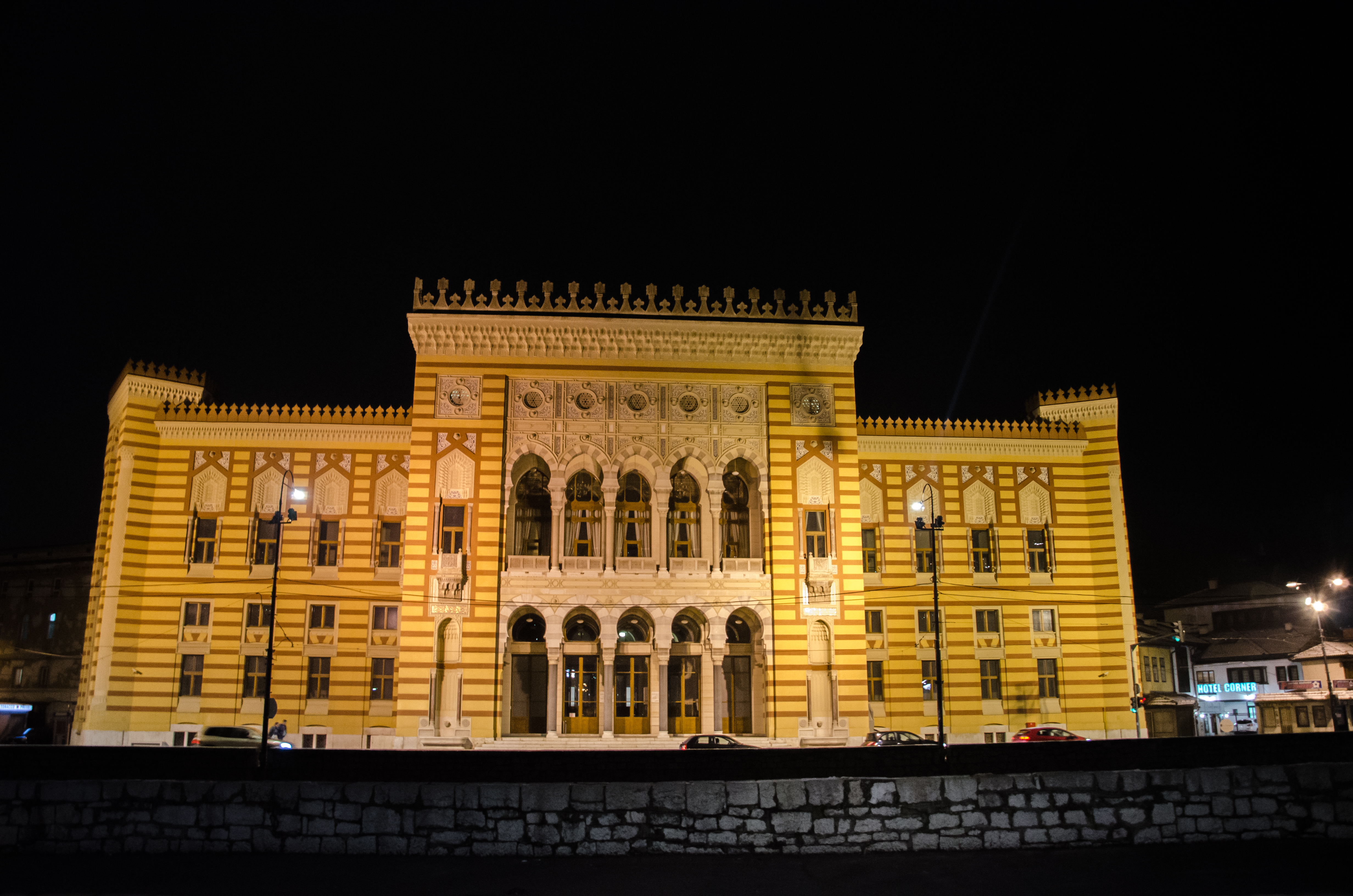 Sarajevo